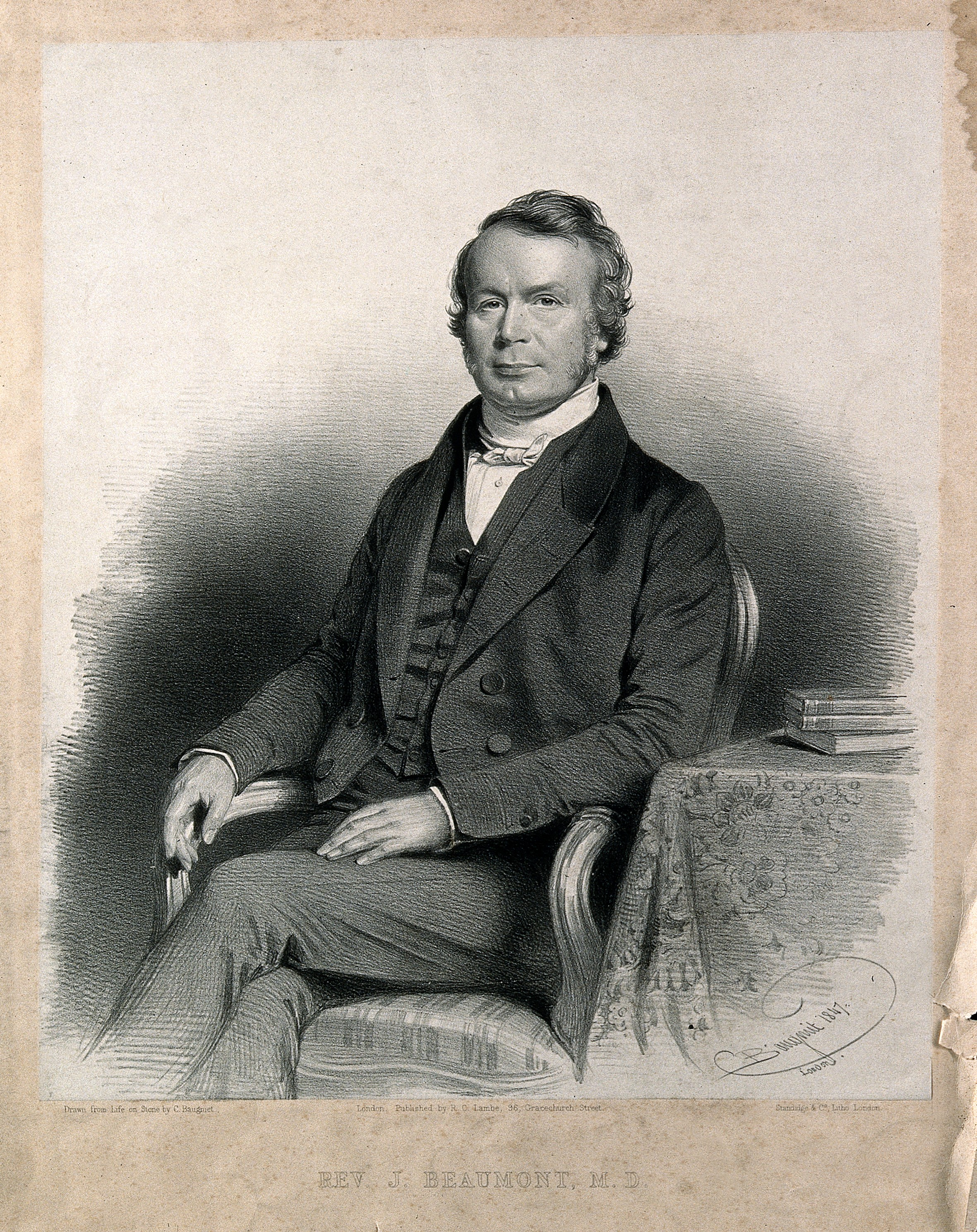 Genre/Technique: Portrait prints. Lithographs. Subject name: Beaumont, Joseph, 1794-1855.